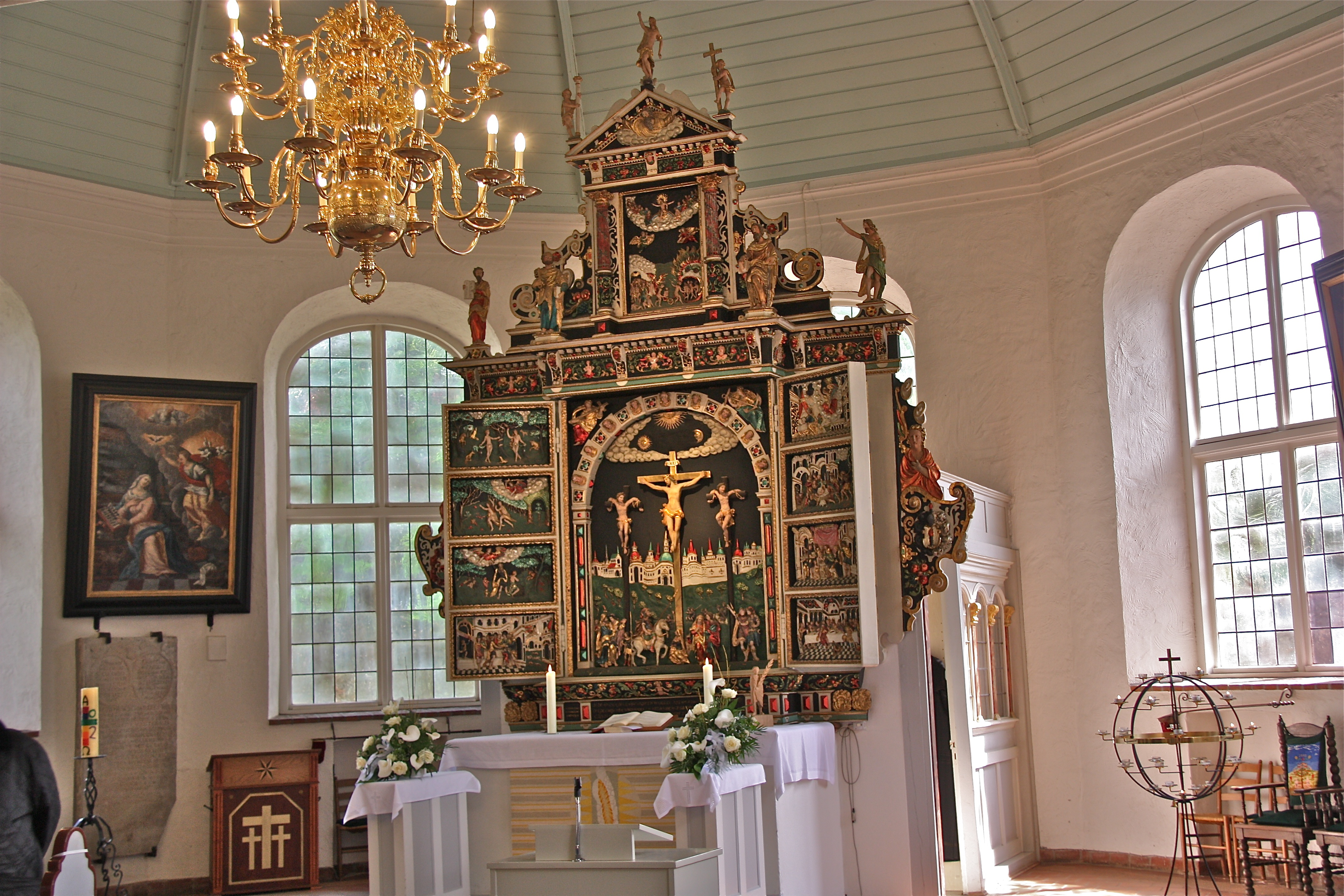 St. Pankratius, Hamburg-Ochsenwerder, Altar von Hein Baxmann